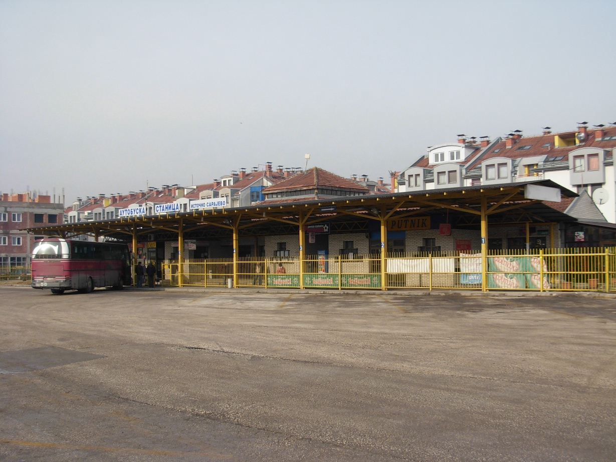 Autobuska stanica u Istočnom Sarajevu, naselje Dobrinja.